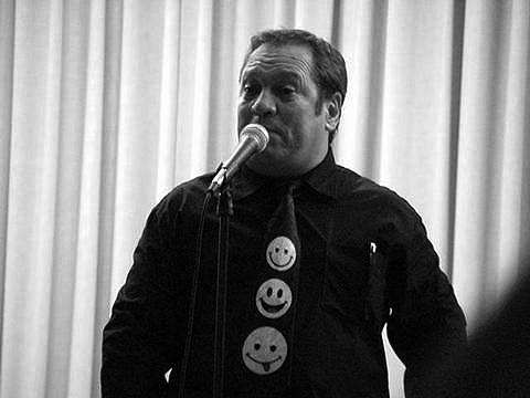 Лицензиране